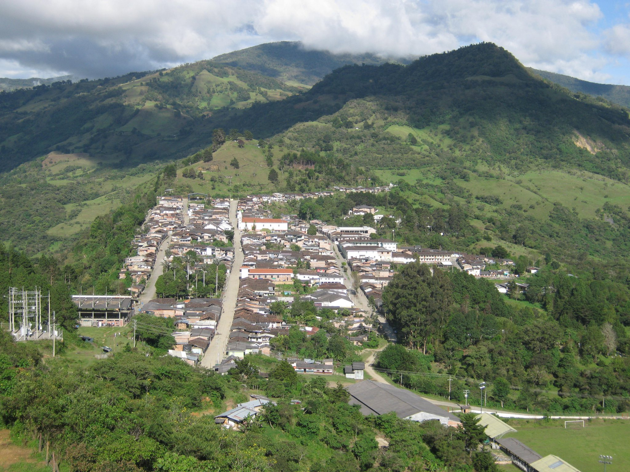 Municipio de Almaguer Cauca, Colombia, América del sur.